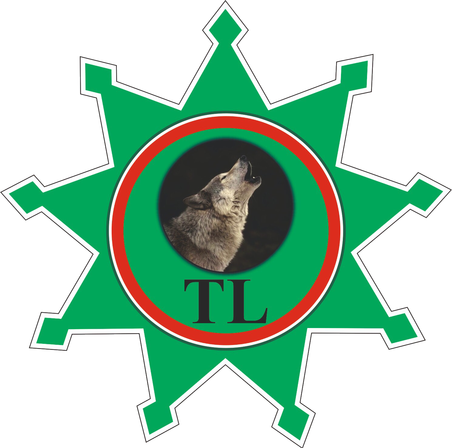 Герб тайпа Терлой